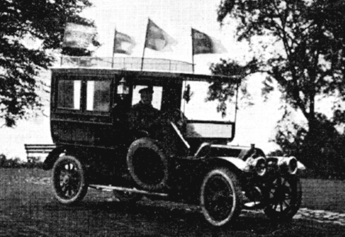 Imperia.